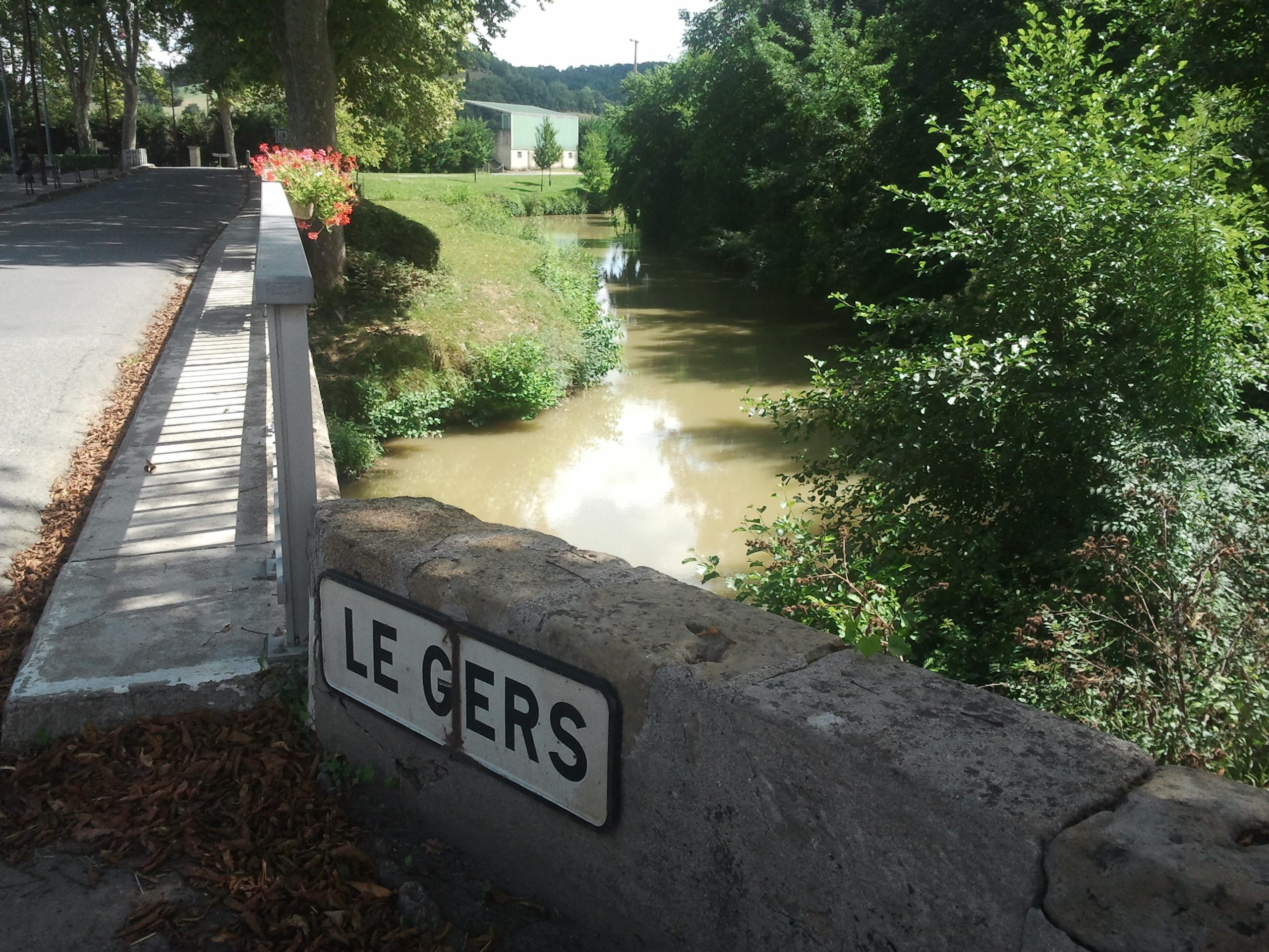 Le pont sur le Gers à Auterrive